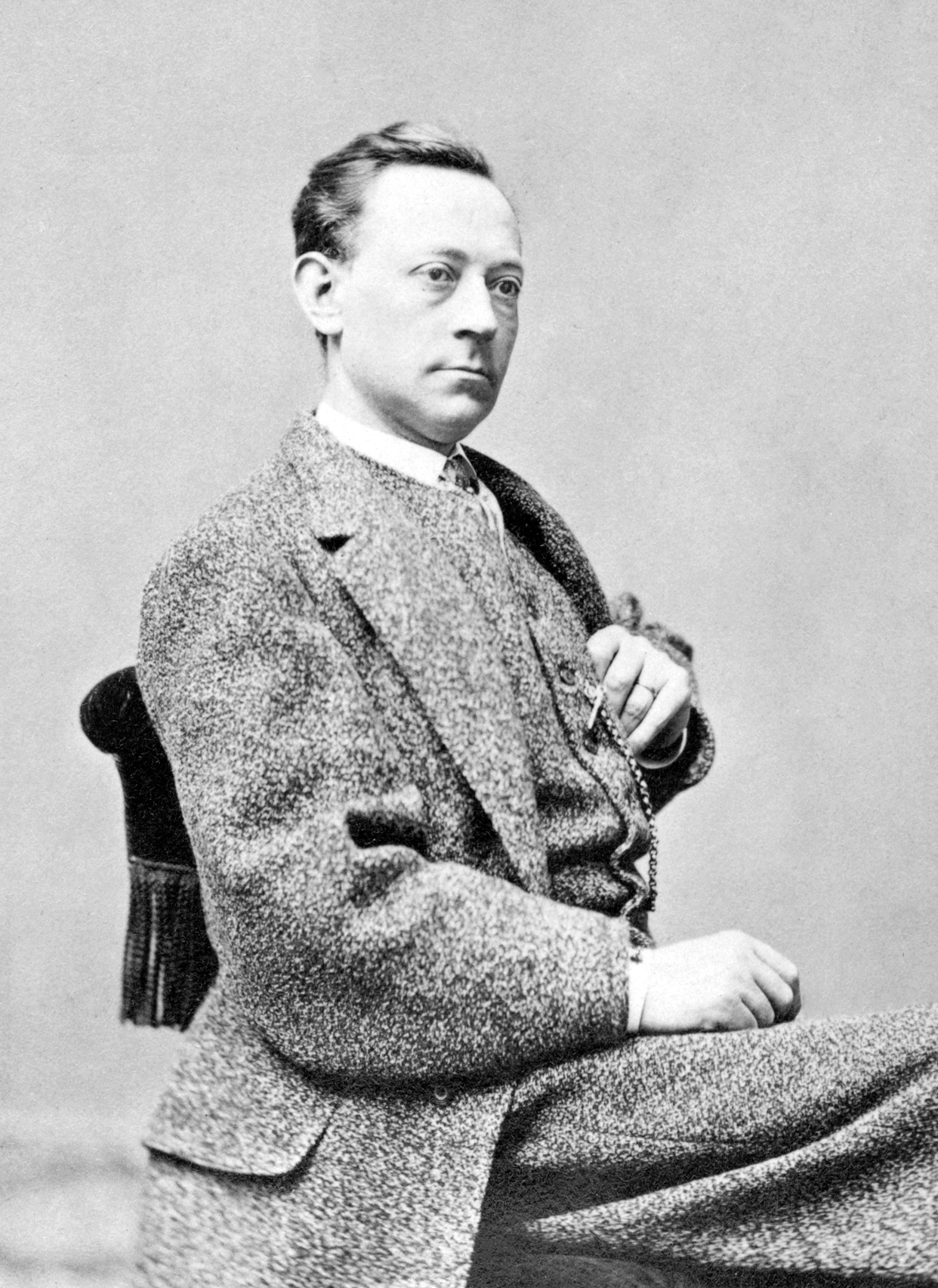 Ferdinand Thegerström, skådespelare vid Södra teatern 1864